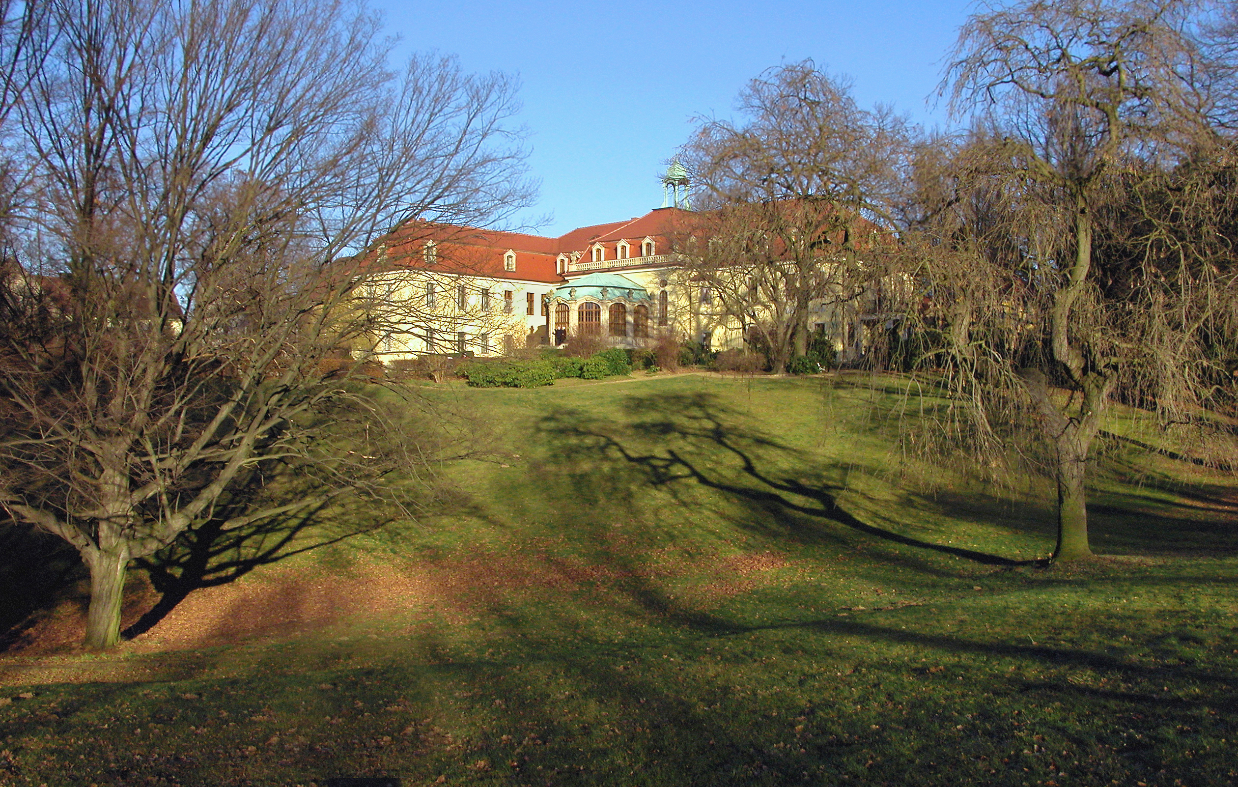 16.01.2005 01662 Proschwitz, Heiliger Grund 2 (GMP: 51.179249,13.475305): Schloß Proschwitz, ein Barockbau von 1732, westlicher Anbau 1832, ist Sachsens ältestes noch existierendes Weingut. Ursprünglich gehörten die Proschwitzer Weinberge dem Meißner Bischof. Ab 1997 Weingut von Dr. Georg Prinz zur Lippe. [DSCN5839.TIF]20050116901DR.JPG(c)Blobelt